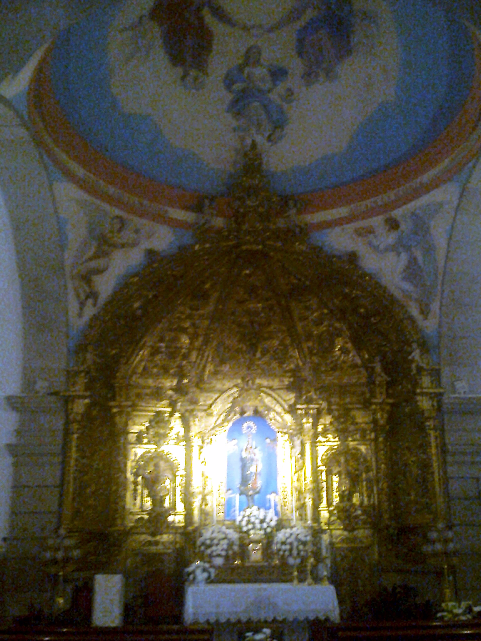 Ermita de Sopetrán, Jarandilla